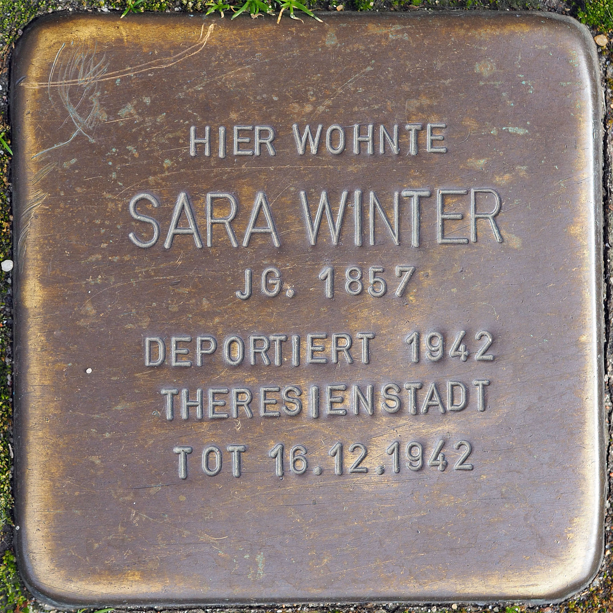 Stolpersteine MG: Winter, Sara